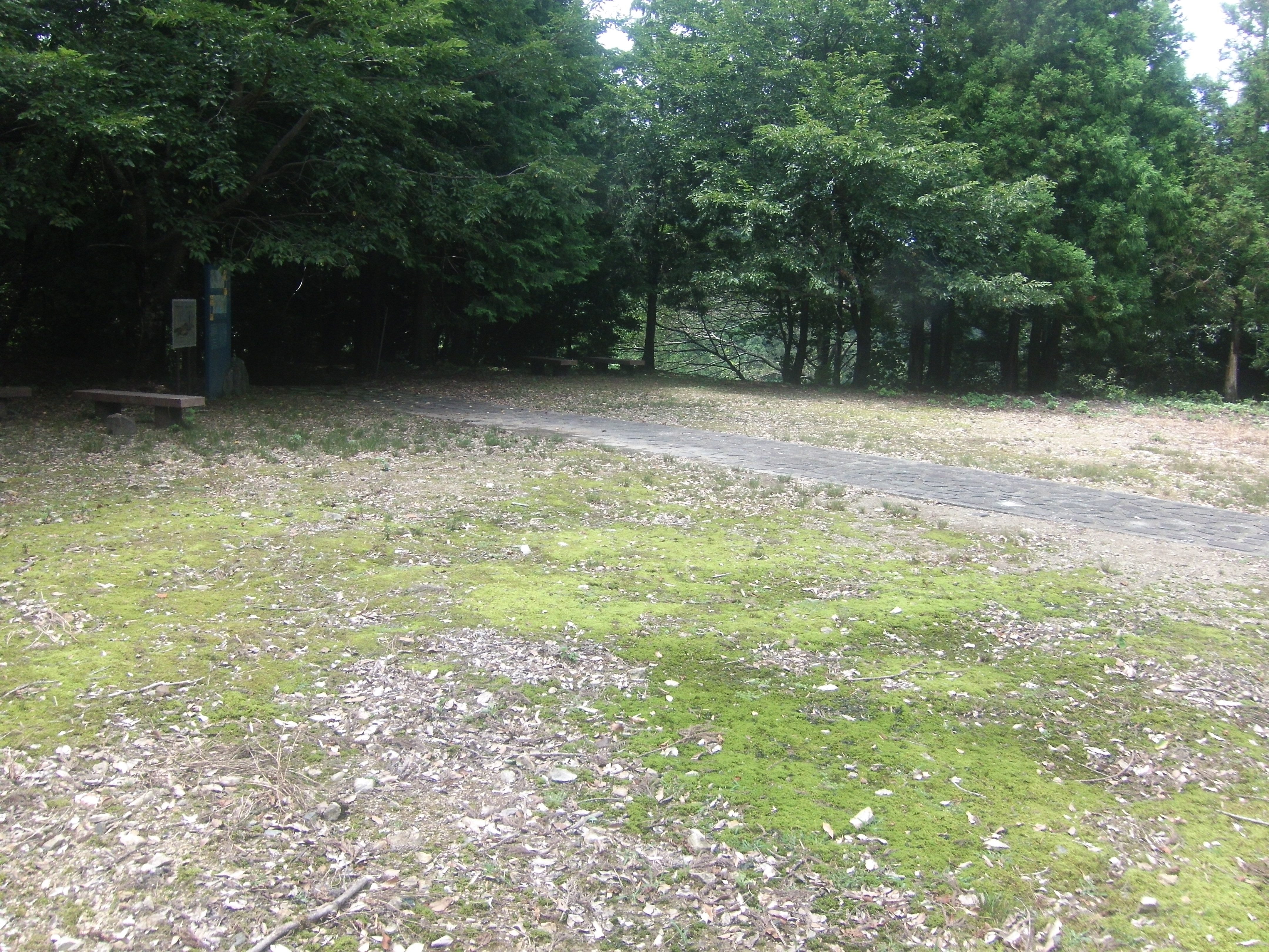 熊野古道・紀伊路の鹿ケ瀬峠